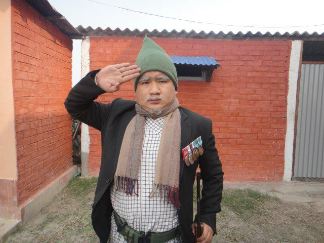 Takme Buda